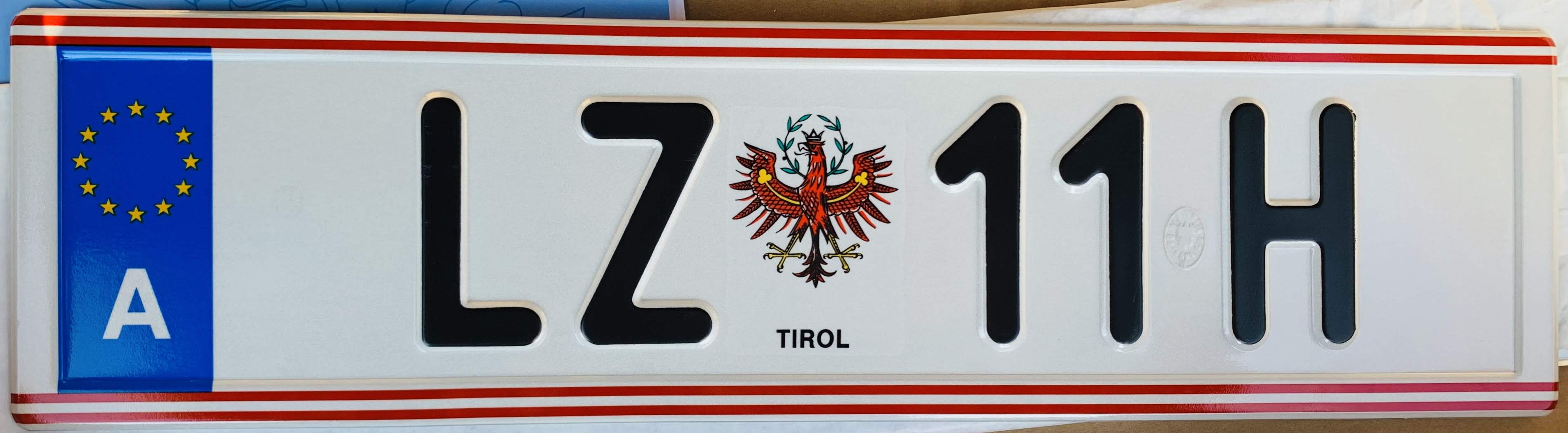 Historisches Kennzeichen Österreich, seit 2019 auf freiwilliger Basis; die amtliche Kennzeichnung des historischen Fahrzeuges erfolgt über die technische (§57a KFG) Prüfplakette mit der Aufschrift "Historisches Fahrzeug)